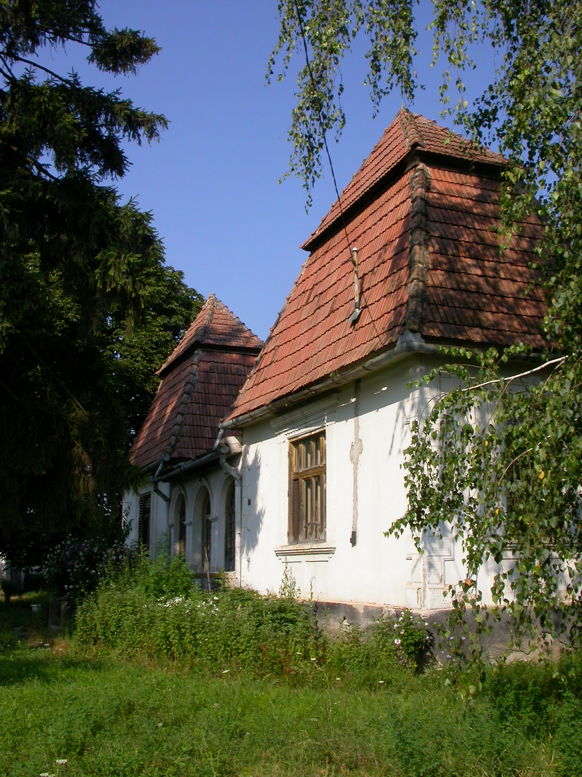 Casă (Conacul Pap)